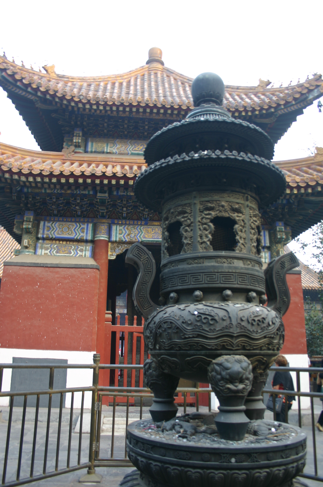 Temple des Lamas (Beijing) Temple Bouddhiste